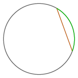 Immagine di un cerchio con arco e corda inscritta Screenshot di un documento SVG: Autore: Utente:Ft1